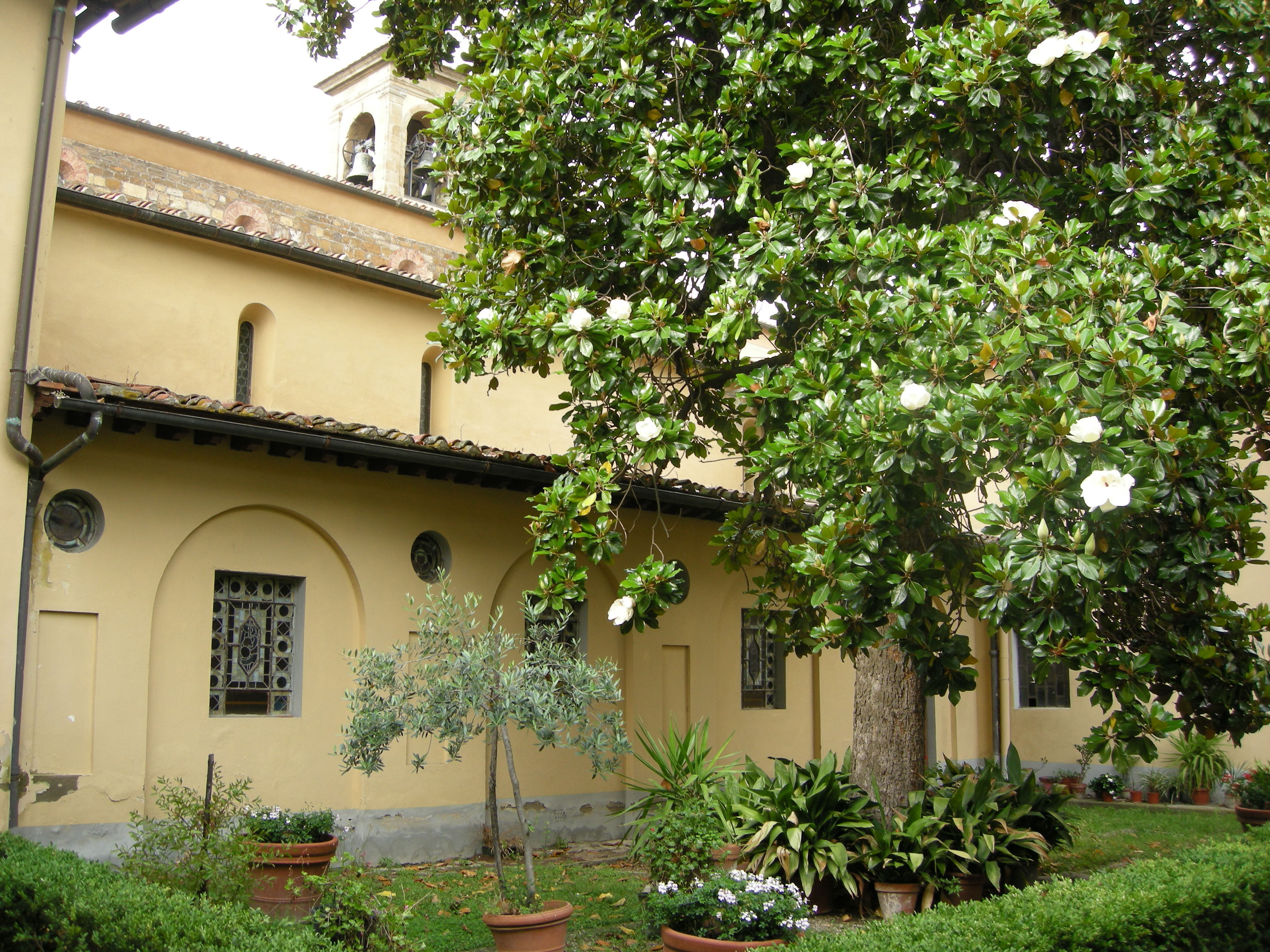 Santo stefano in pane, chisotrino